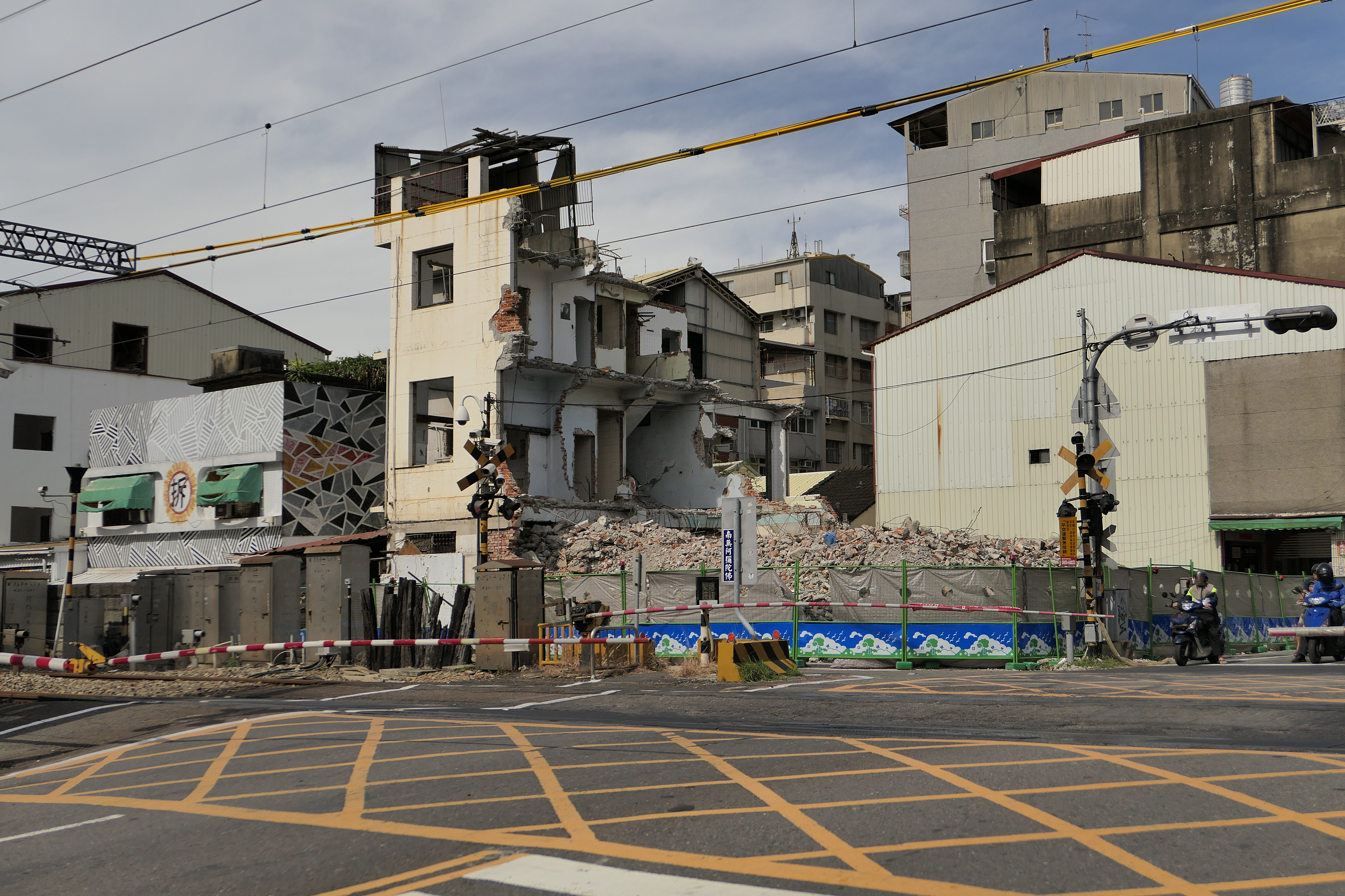 2019年拍攝的青年路平交道，圖中被拆毀的建築即是因為鐵路地下化工程而拆毀。